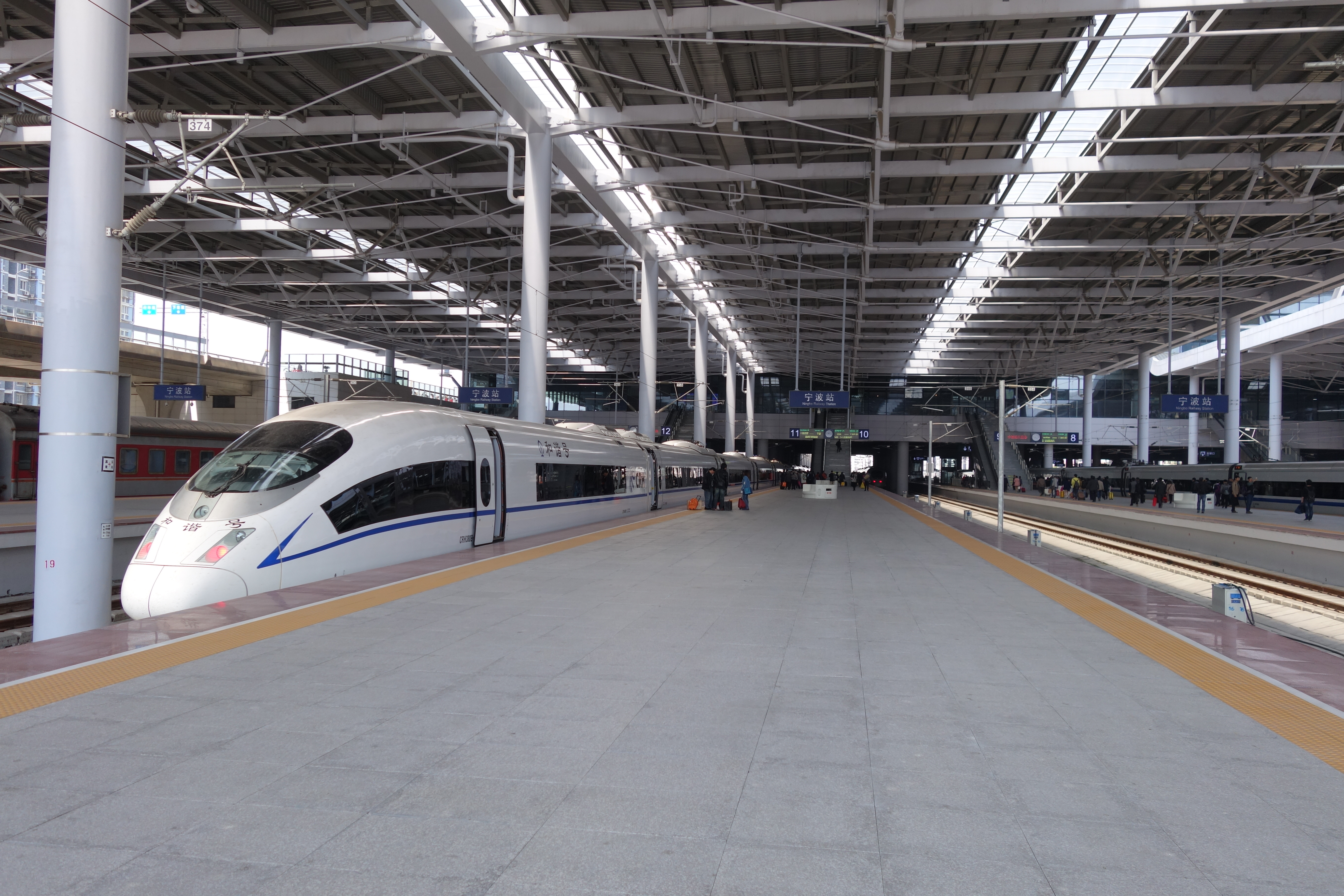 宁波站内的CRH380BL列车